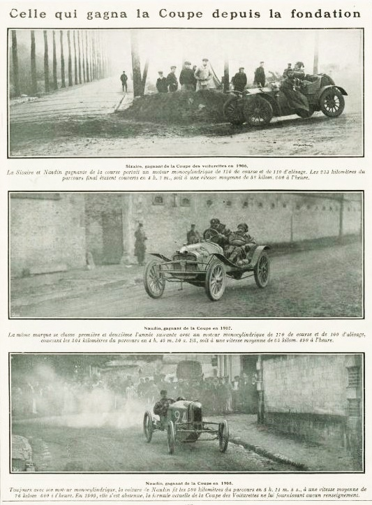 Vainqueurs de la Coupe des Voiturettes en 1906, 1907 et 1908, La Vie au Grand Air, 26 juin 1909, page 410.